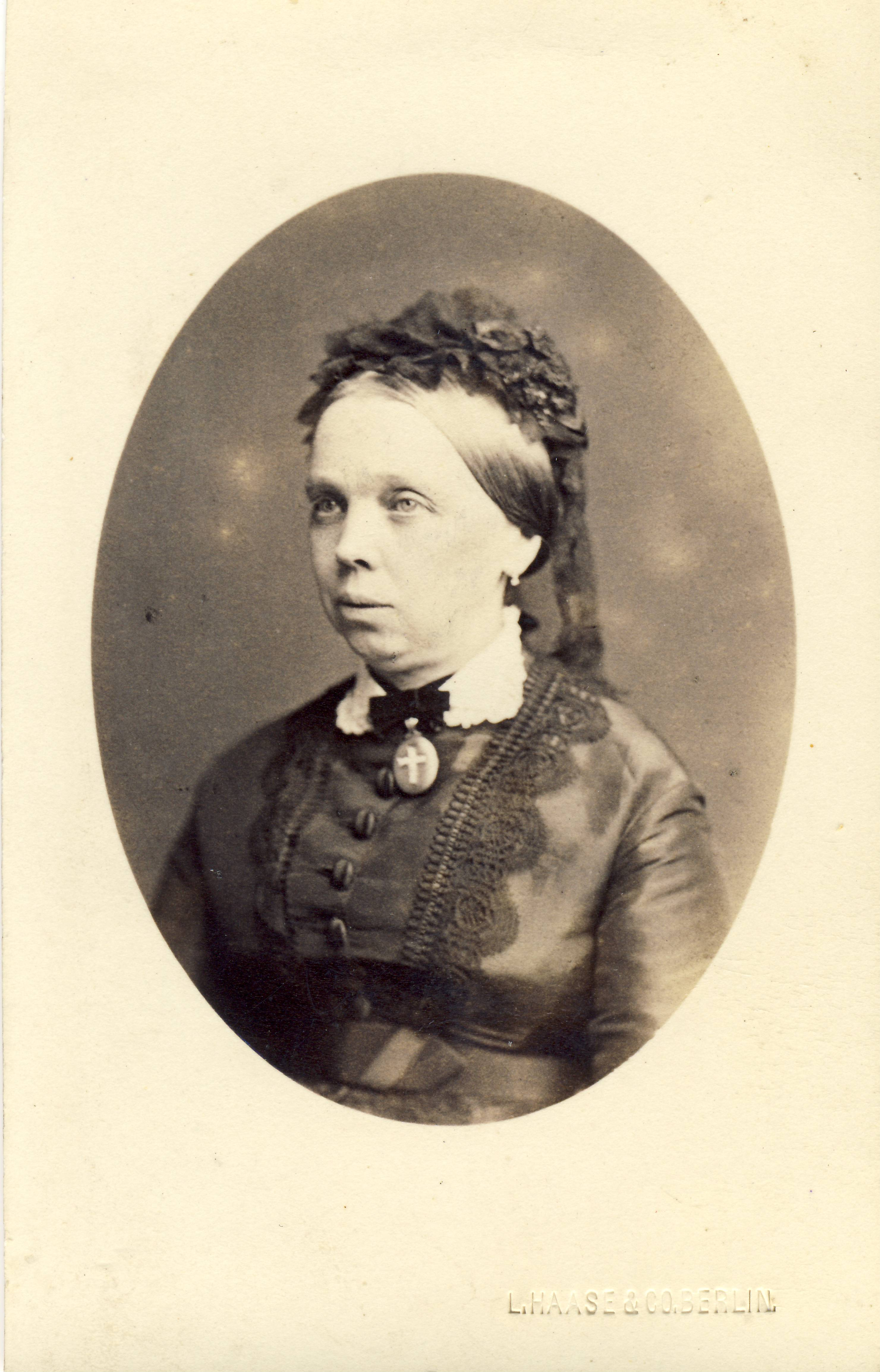 Marie Luise Girard de Soucanton (1821–1901)